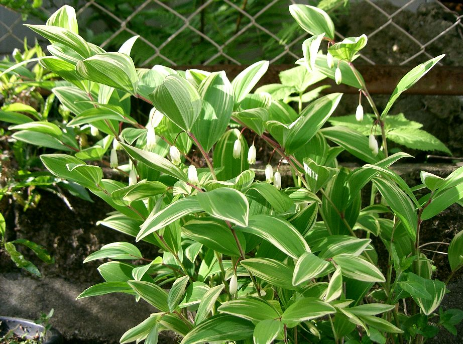 Polygonatum odoratum